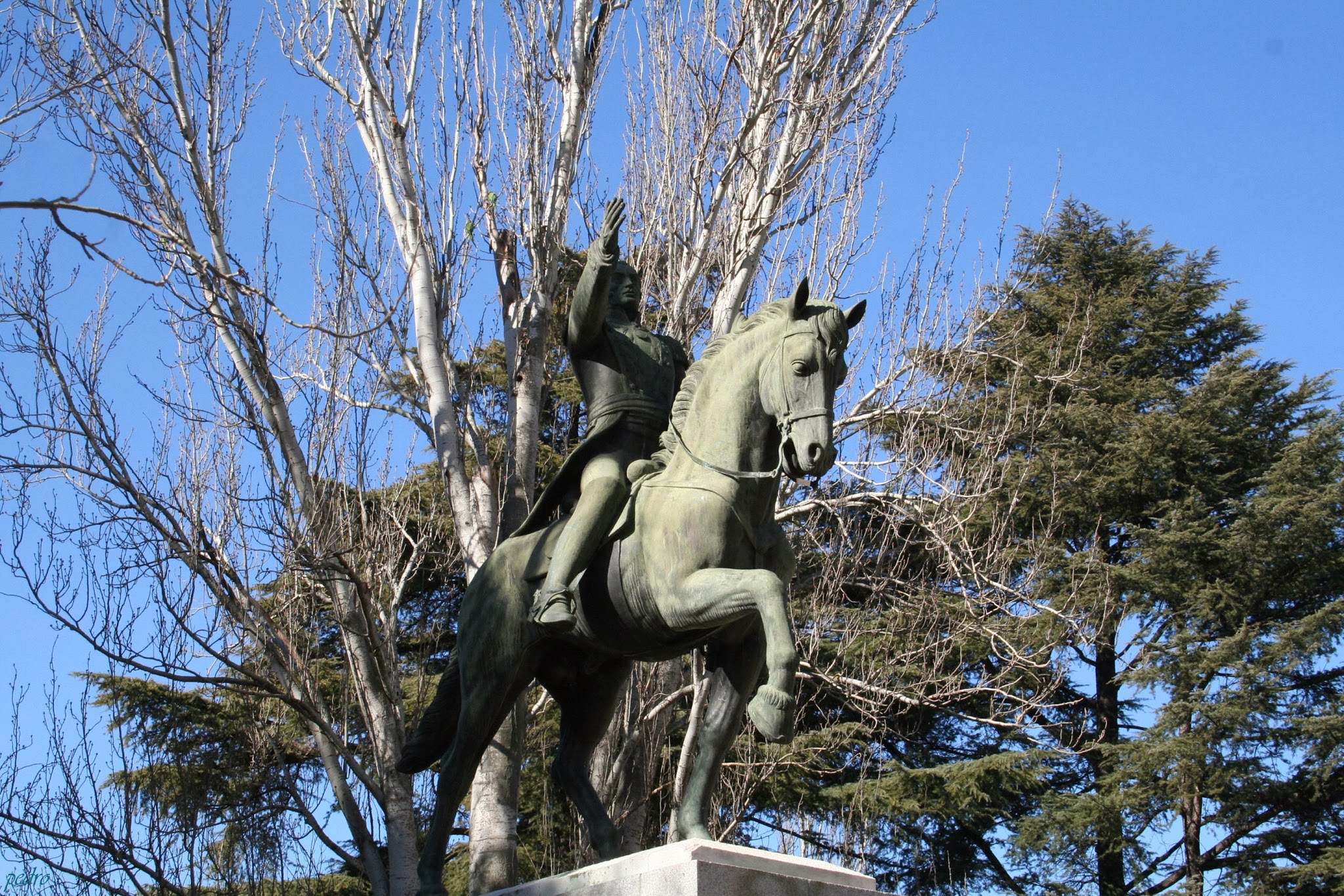 Monumento Simon Bolivar (5)